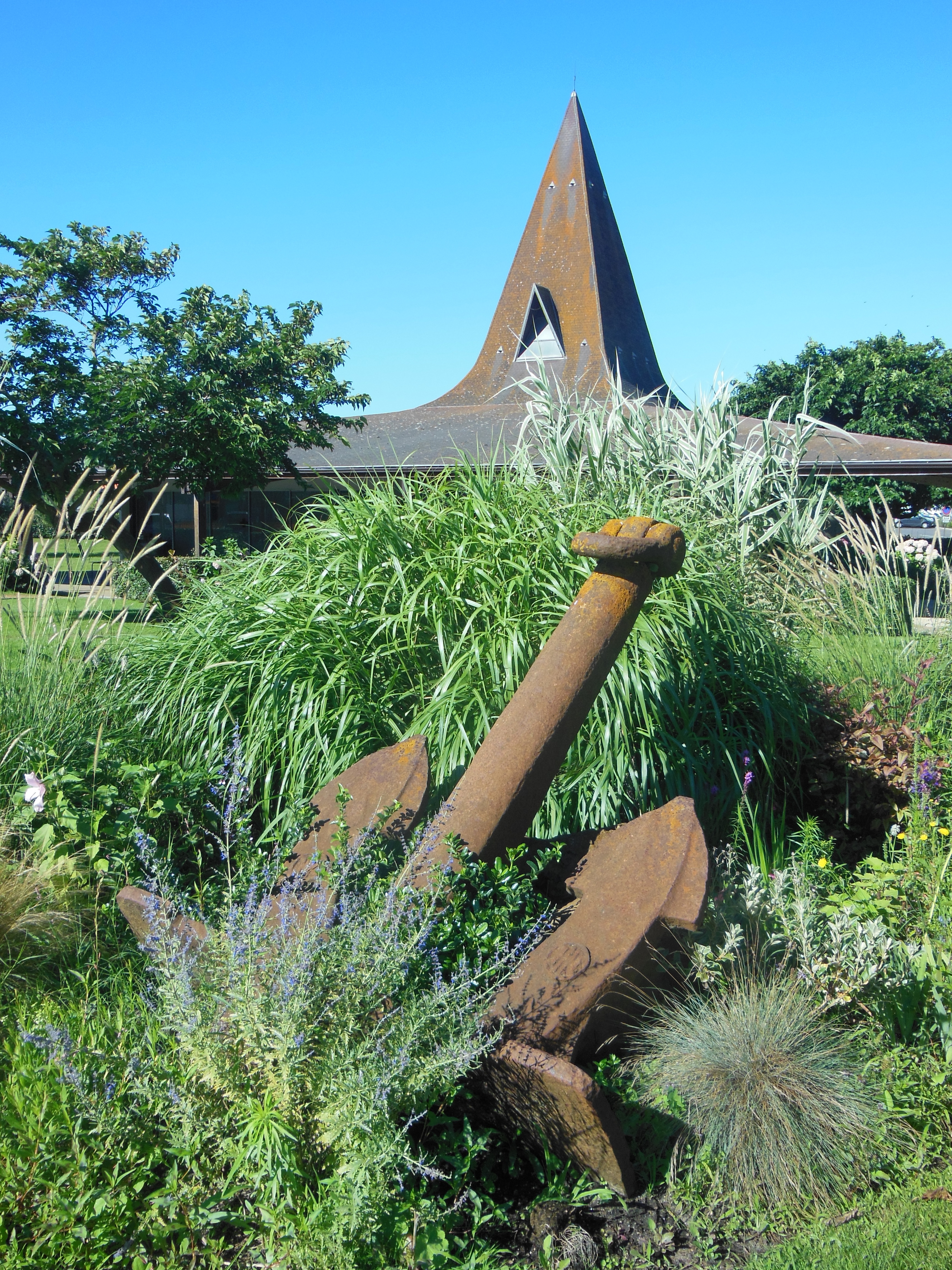 Chapelle Notre-Dame des Dunes de Mimizan-Plage (Landes, France).